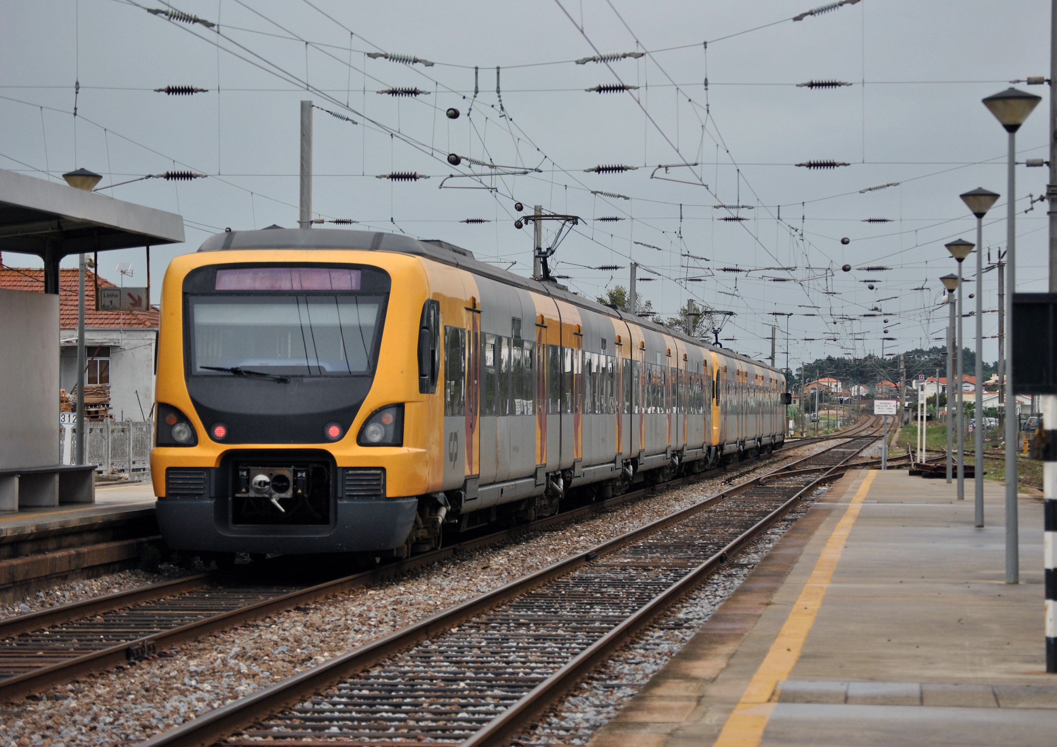 Dupla UME em Esmoriz